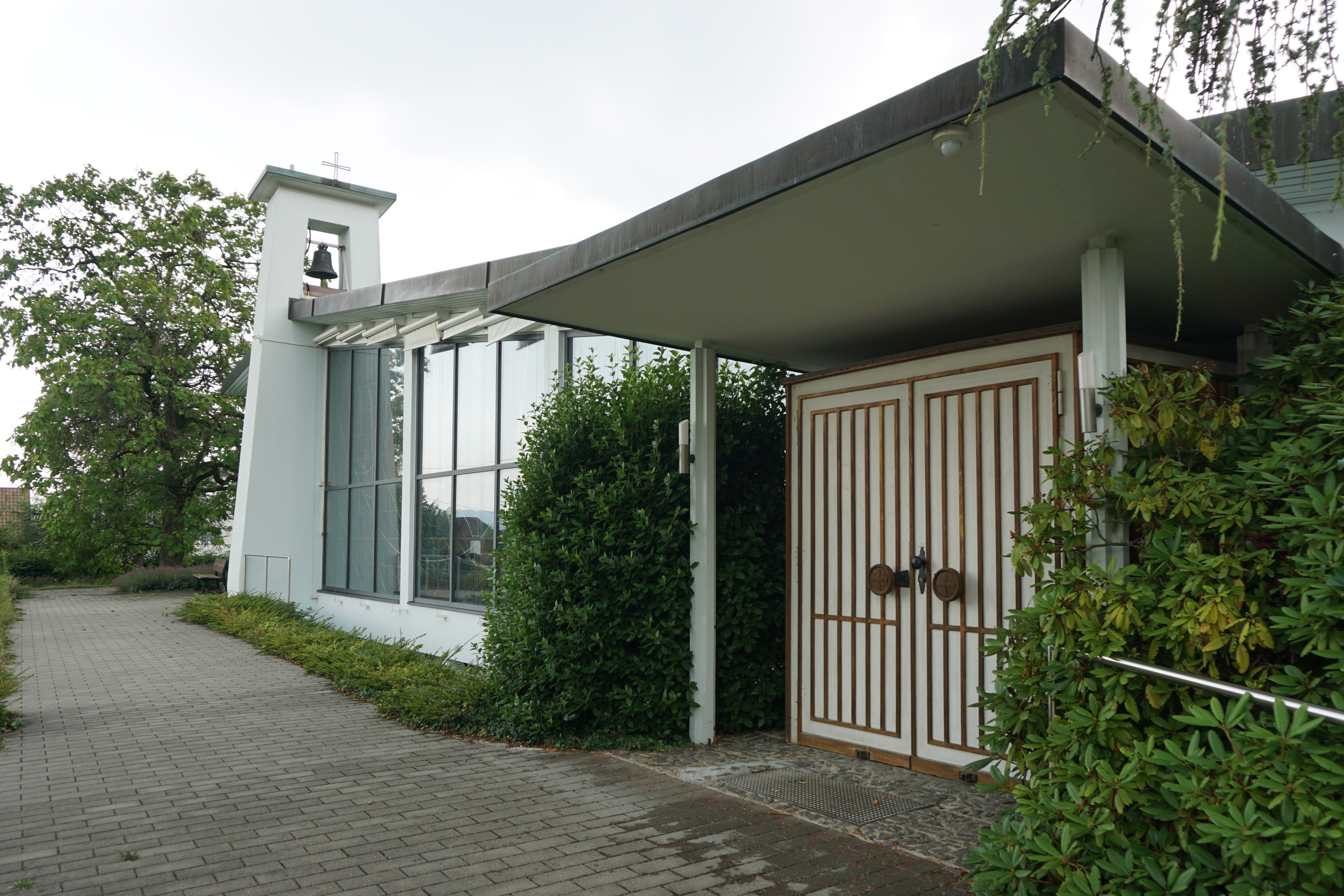 Überdachter Eingang der Kirche mit Glasfassade und Glockenträger